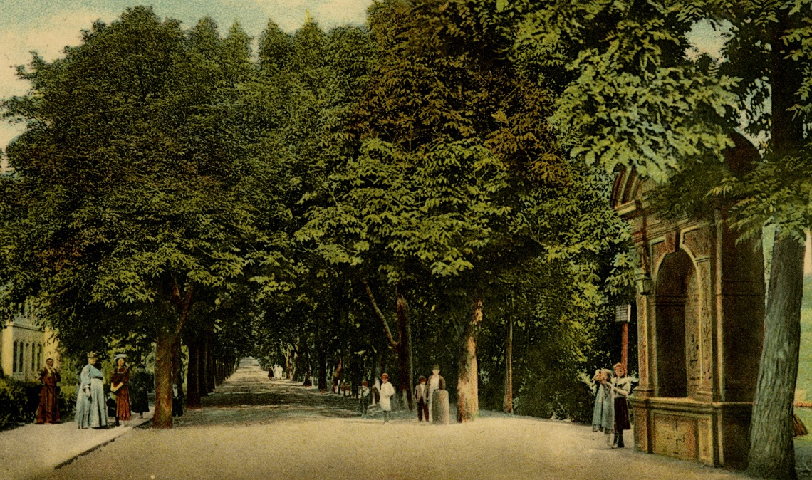 historická kolorovaná fotografie (kolem 1910)